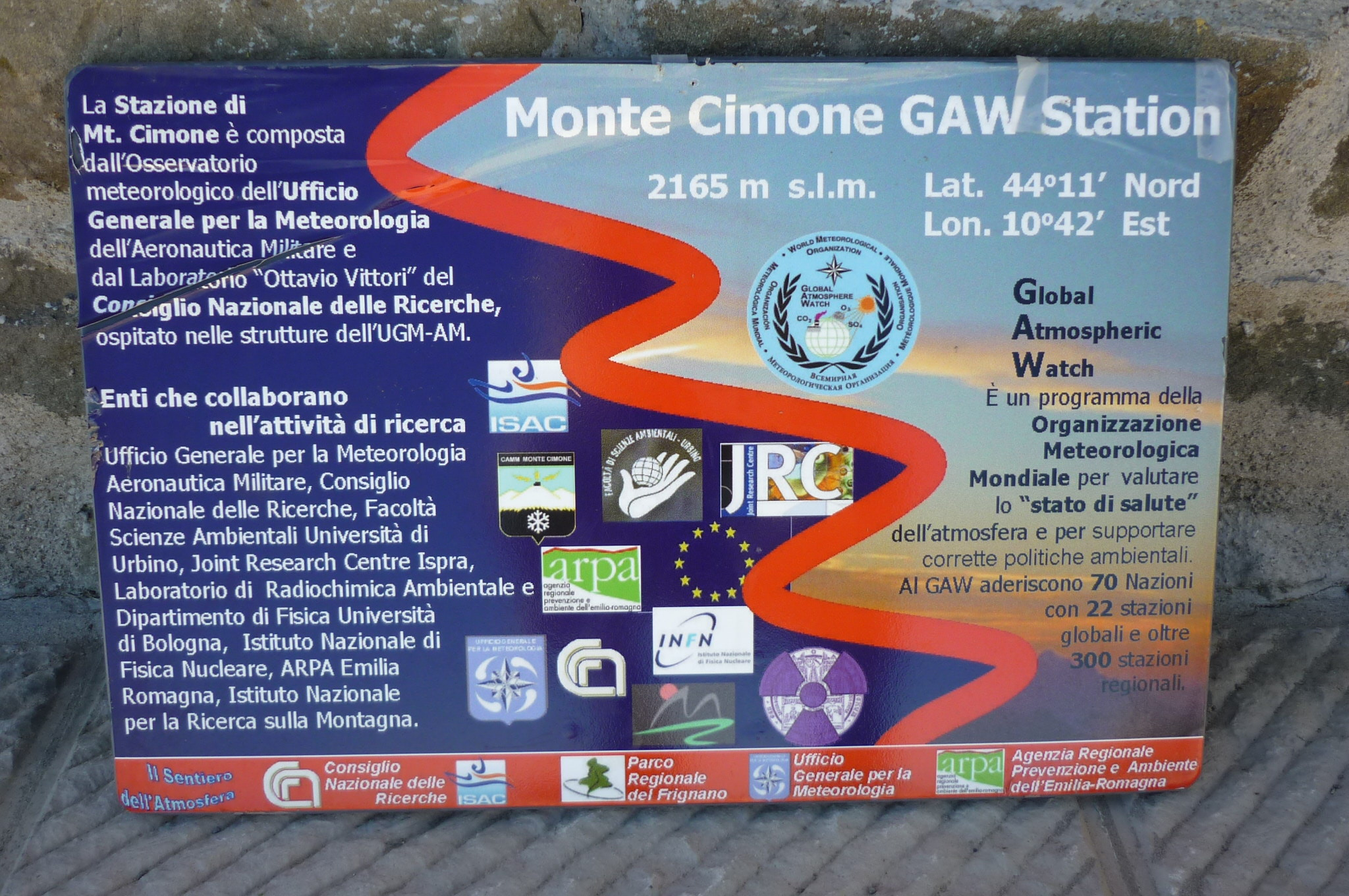 Tafel auf dem Monte Cimone